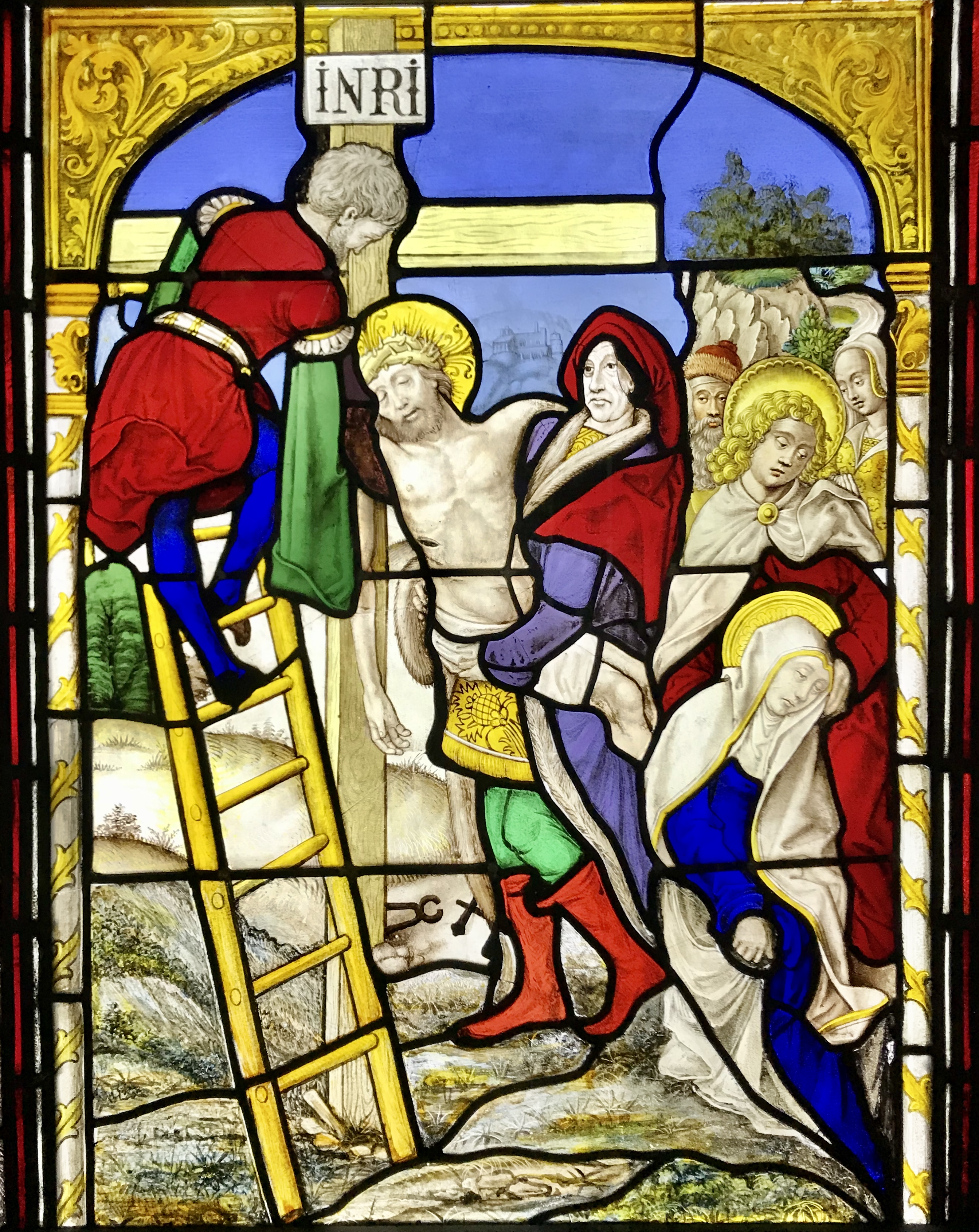 Das Christusfenster im Kölner Dom im Erdgeschoss des nördlichen Querhauses zeigt Szenen aus dem Leben Christi. Szene: Christus wird vom Kreuz genommen. (Um 1525)